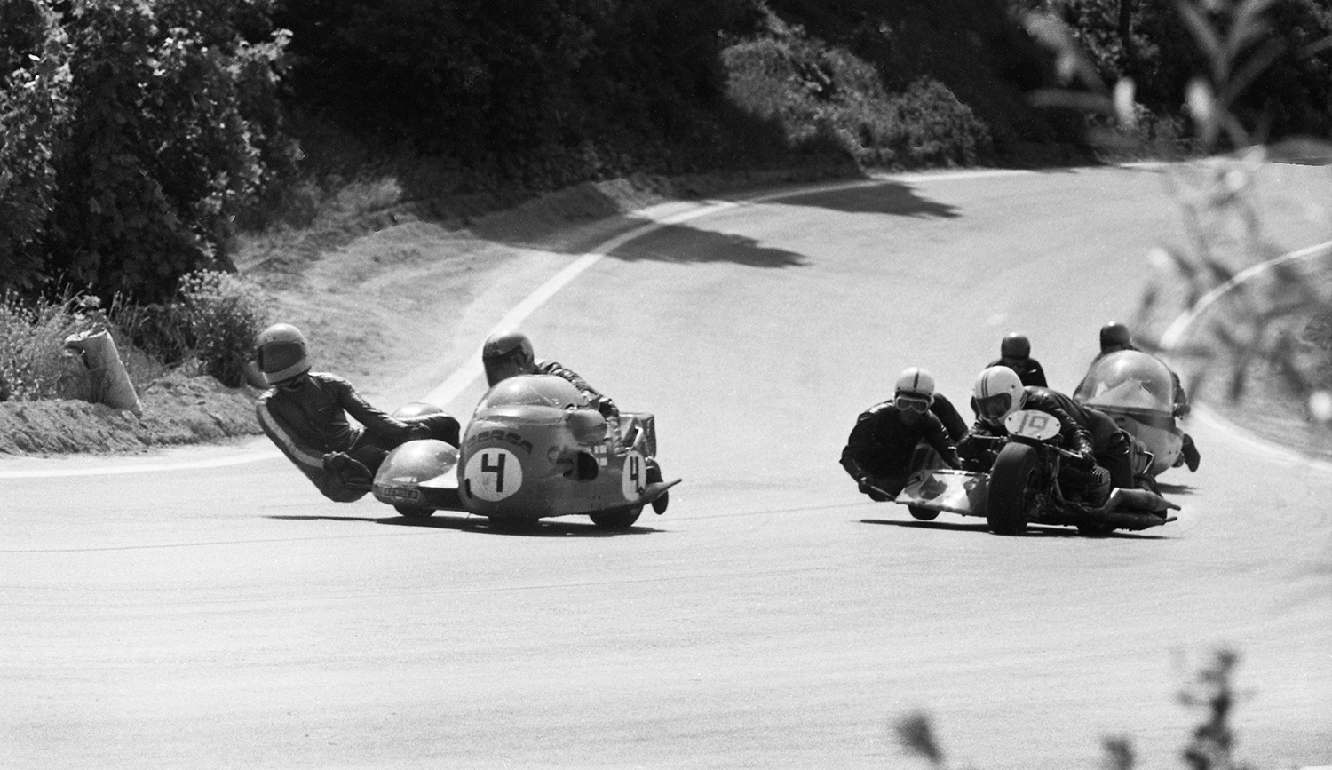 Pirita-Kose-Kloostrimetsa ringrada 74 (4)